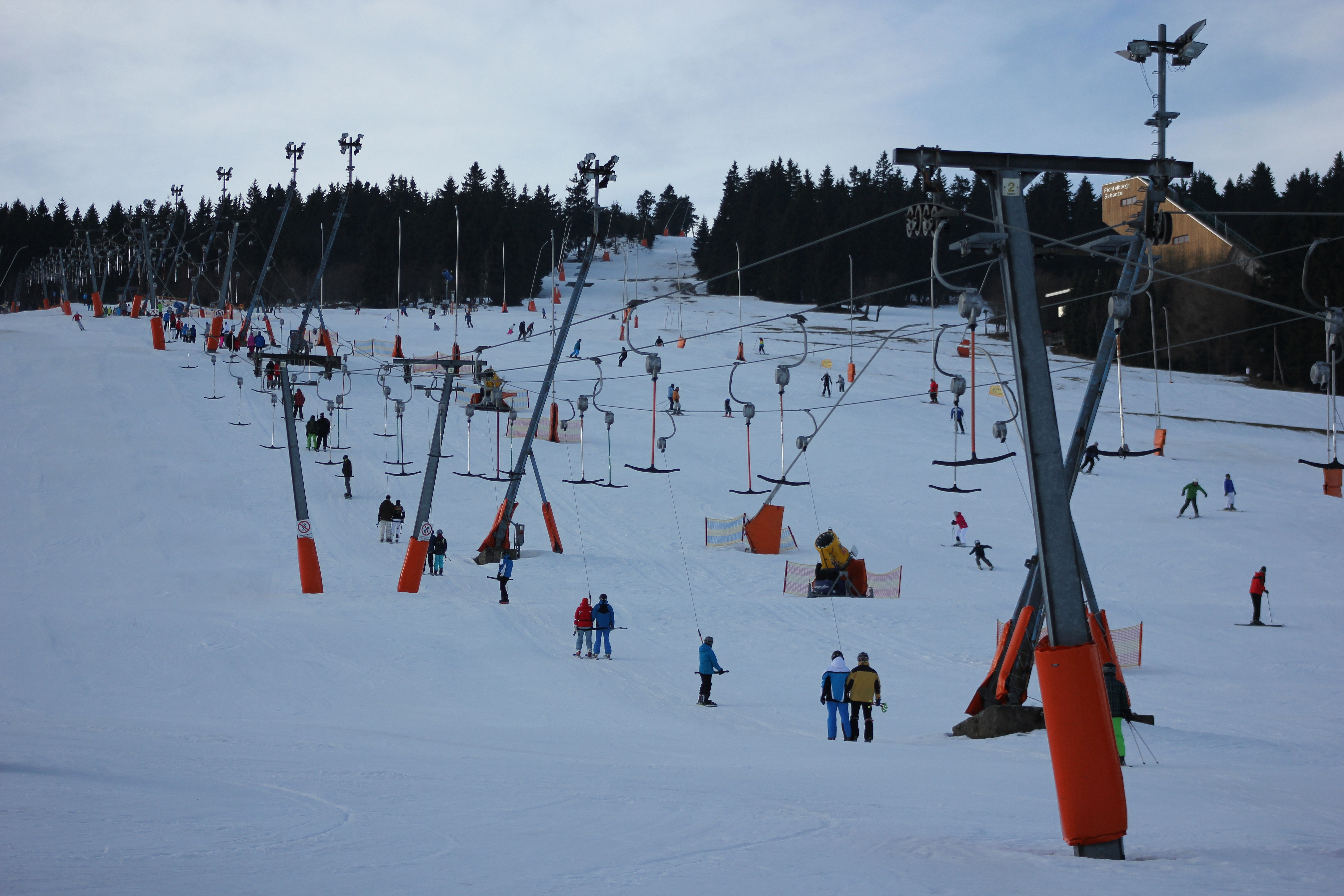 Auf dem Fichtelberg befindet sich das 1962 gegründete und 5,48 km² große Landschaftsschutzgebiet Fichtelberg (LSG-Nr. 320795), auf dem Südhang das 1961 gegründete, 18,67 ha große und zweiteilige Naturschutzgebiet Fichtelberg mit Schönjungferngrund (NSG-Nr. 163092) und direkt südwestlich davon das 1997 gegründete, 73,15 ha große und mehrteilige Naturschutzgebiet Fichtelberg-Südhang (NSG-Nr. 163093). Westlich davon liegt am Kleinen Fichtelberg das 1967 gegründete, 5,25 ha große und einteilige Naturschutzgebiet Rohr- oder Schilfwiese (NSG-Nr. 165205). Diese Gebiete überschneiden sich mit dem Fauna-Flora-Habitat-Gebiet Fichtelbergwiesen (FFH-Nr. 5543-304).[9]